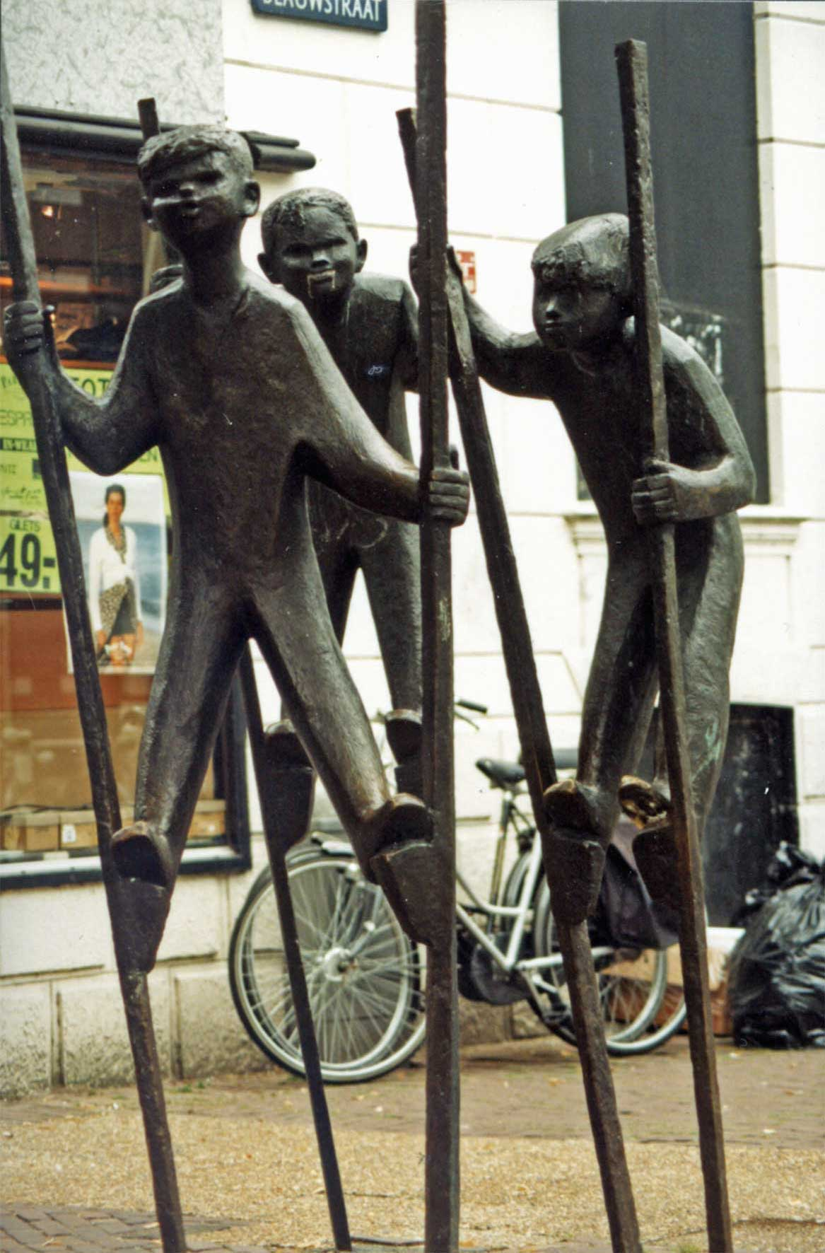 Spelende kinderen oorspronkelijk geplaatst hoek Blauwstraat/Hoogstraat te Gouda